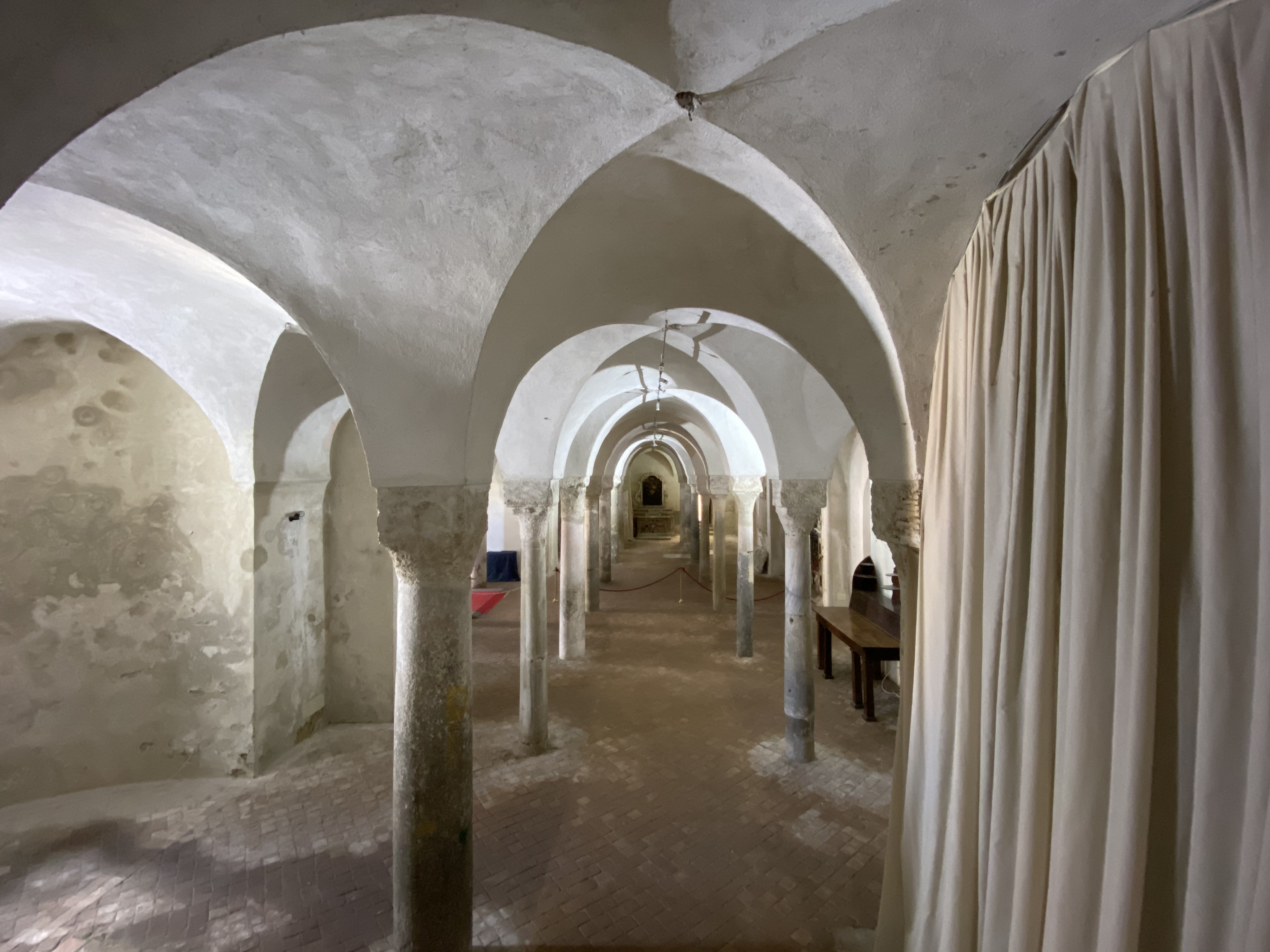 Cripta del Duomo di Gerace